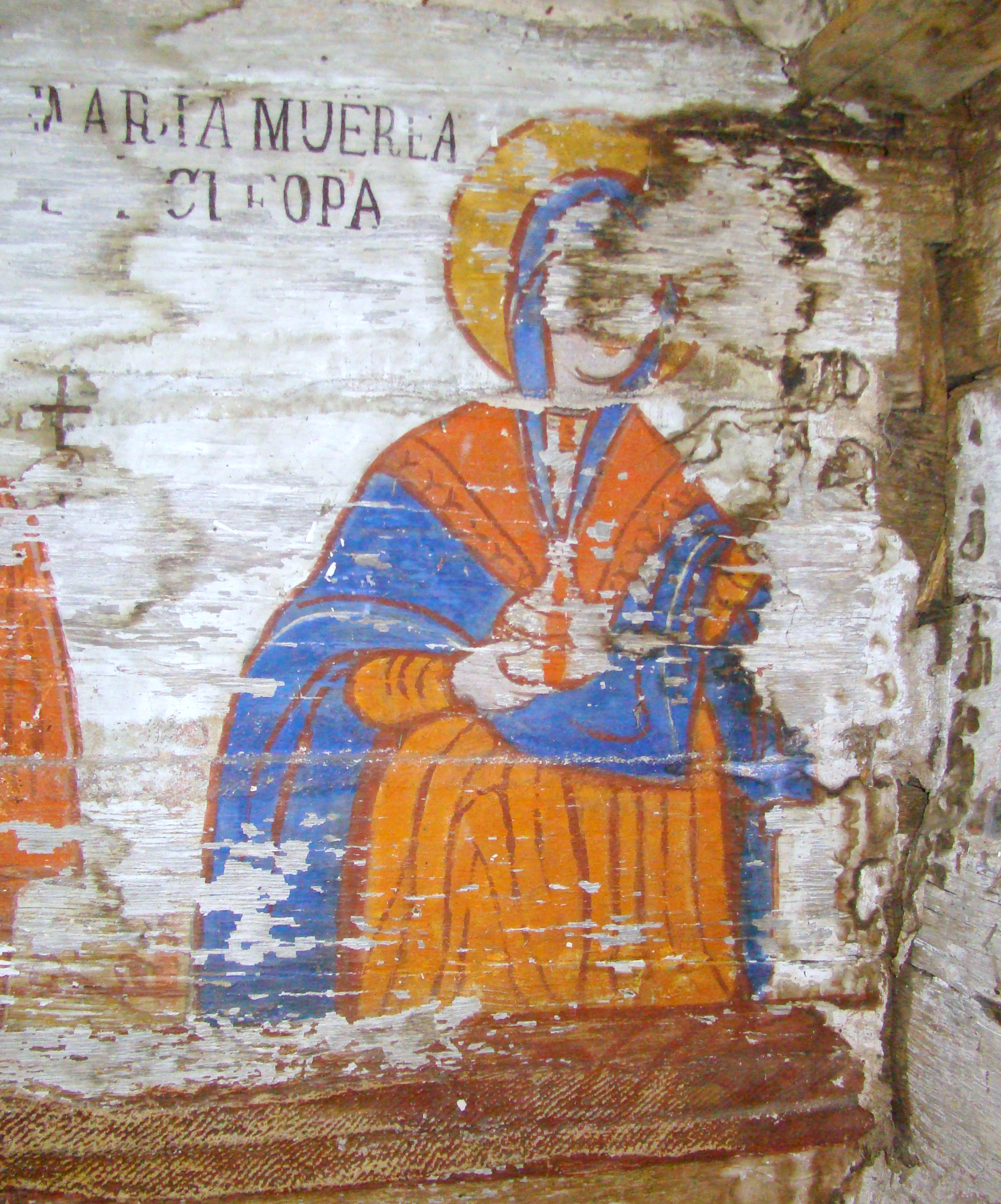 Pronaos: Sfânta, purtătoare de mir, Maria lui Cleopa. Sfânta Mironosiță Maria lui Cleopa, Biserica de lemn "Sfinții Arhangheli Mihail şi Gavriil, sat CALNA; comuna VAD, județul Cluj